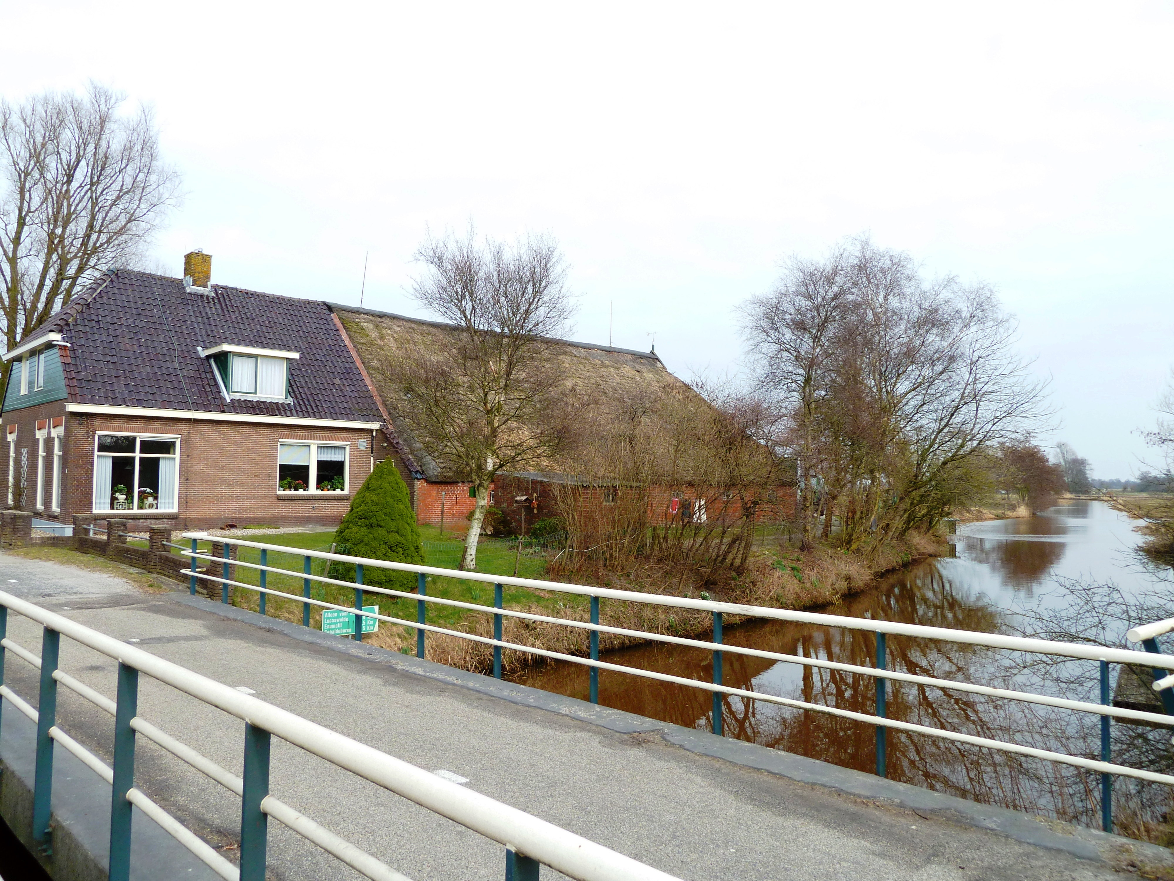 Balktil met het Dwarsdiep nabij Marum (Groningen, Nederland).